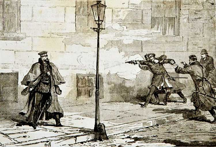 Attentato allo zar Alessandro II del 1879